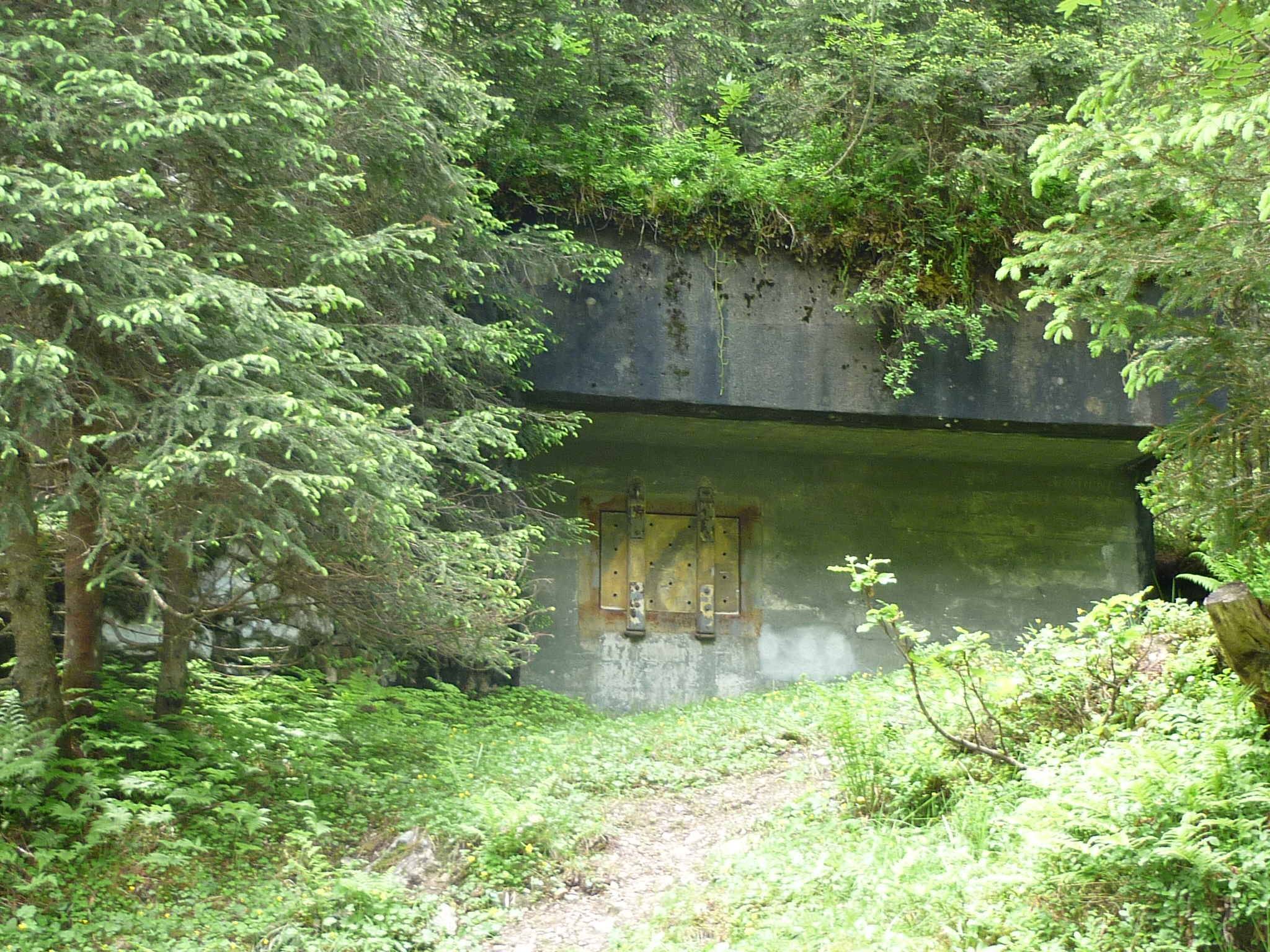 Sperrstelle Pardenn, Klosters GR, Schweiz